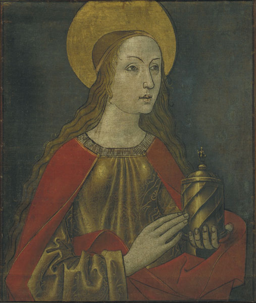 Tabla perteneciente al órgano de la catedral de Santa María de Urgel, realizada c. 1495-1498 por el llamado Maestro de la Seo de Urgel (siglo XV).